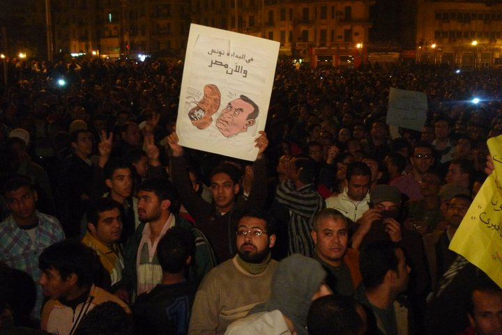 180845_501518844290_511364290_5849817_2392734_n